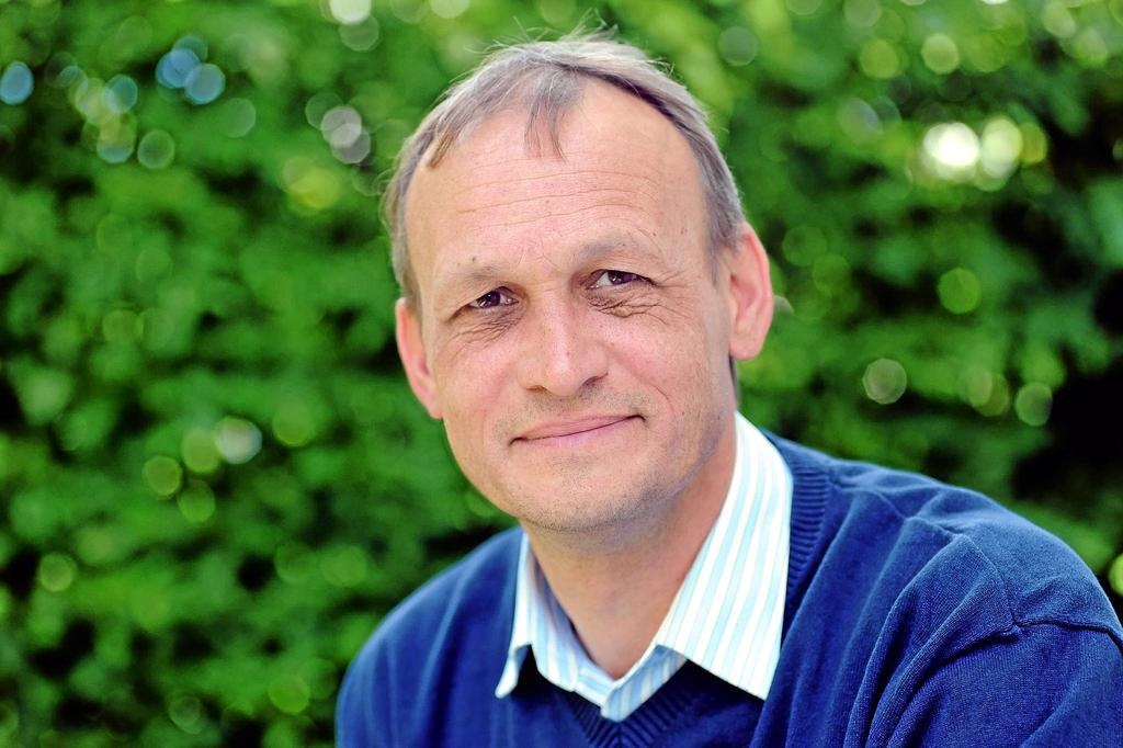 Helmut Mueller-Enbergs